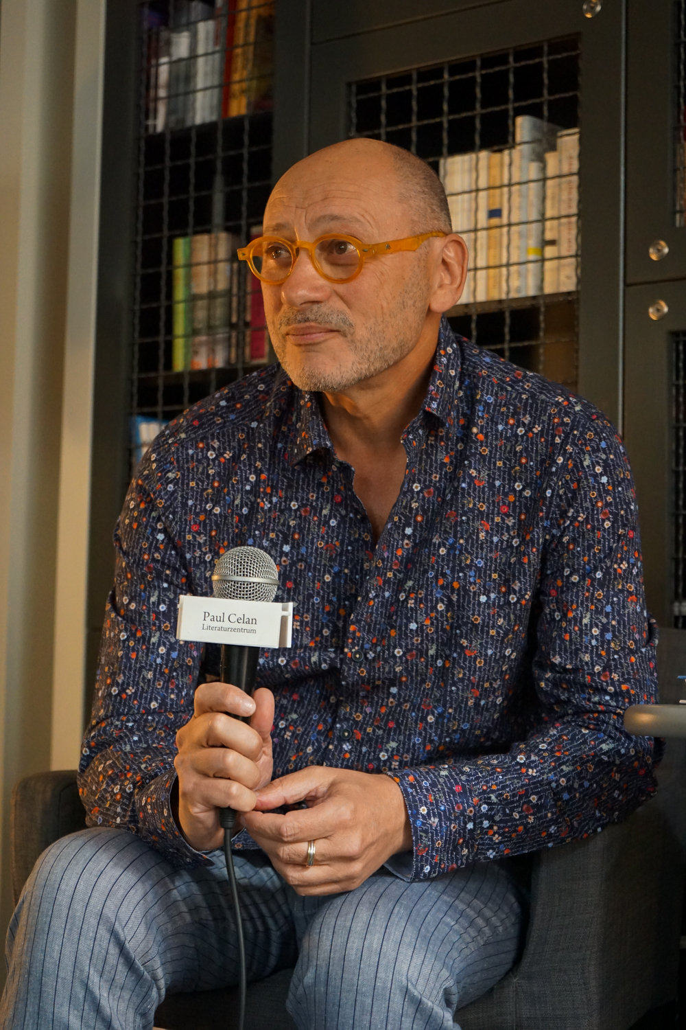 Анатолий Вишевский на литературном фестивале в Черновцах